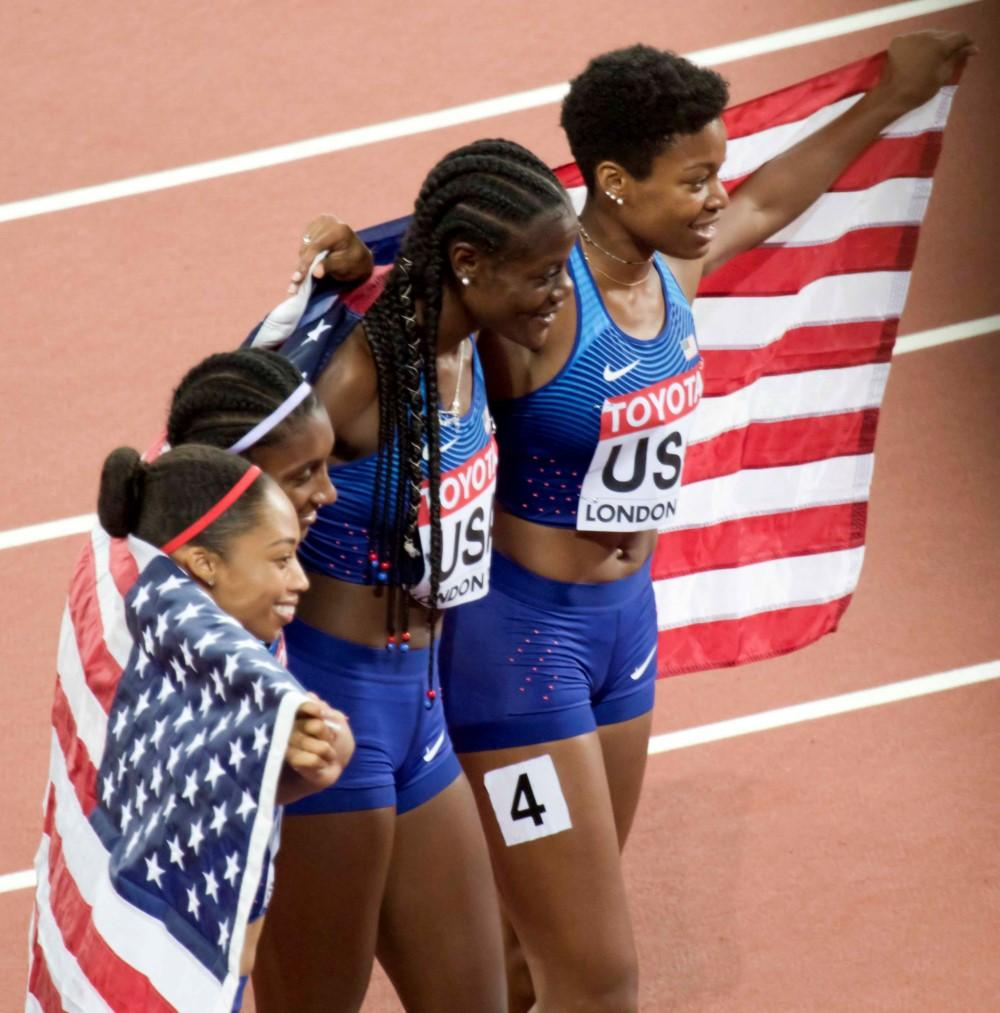 d9_13 finale 4x400m team usax